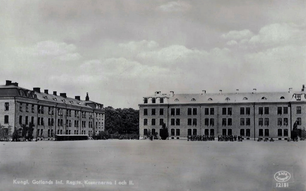 Gotlands infanteriregementes (Gotlands regemente) 1:a (till höger) och 2:a (till vänster) kasern på Viborgs slätt.